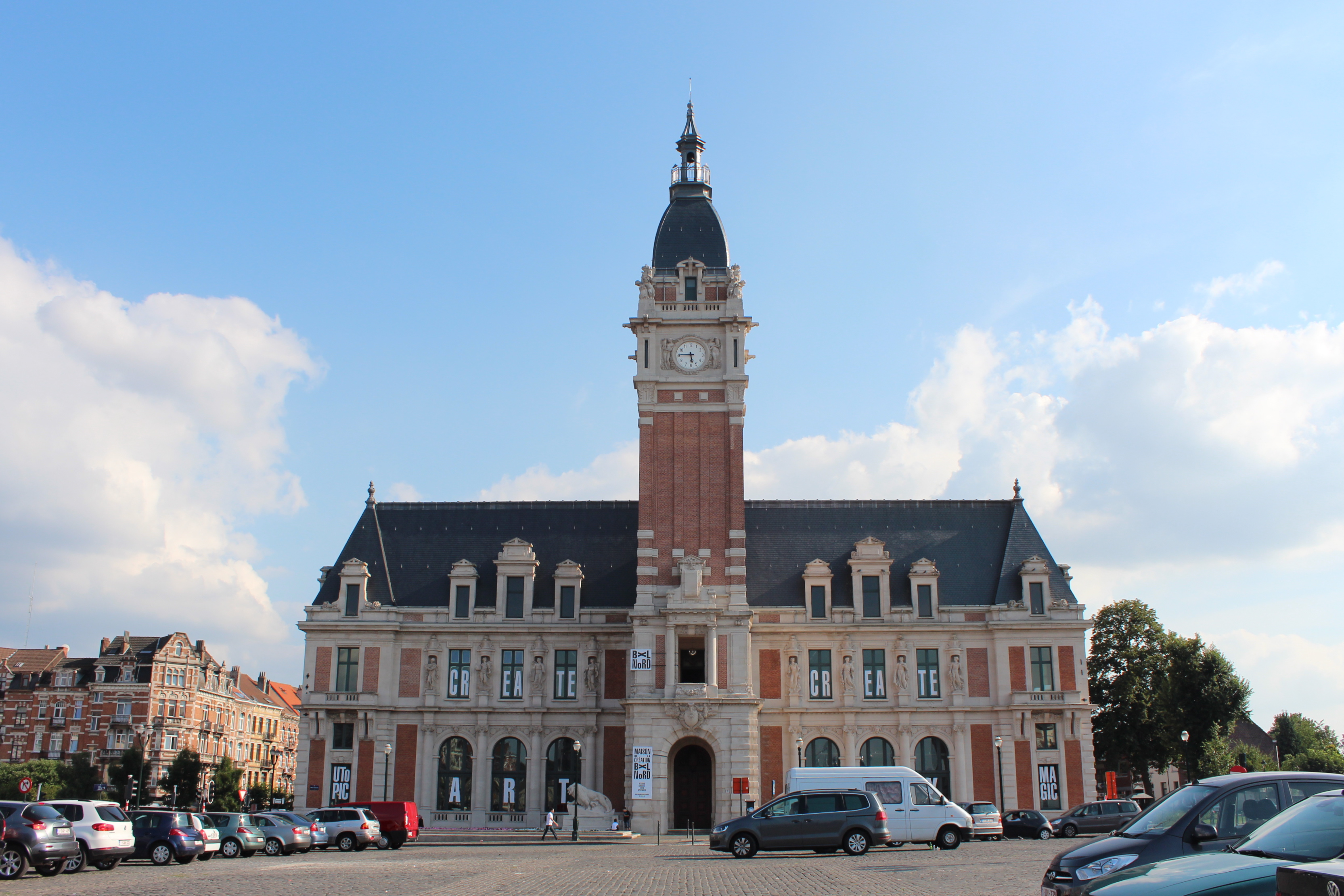 Ancienne maison communale de Laeken. Construit en 1907 par Paul BONDUELLE (Style: Eclectisme). Décision définitive de protection : 13/04/1995.